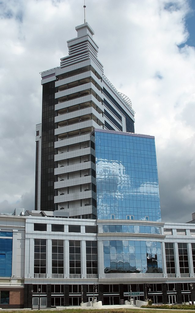 Grand Hotel Kazan